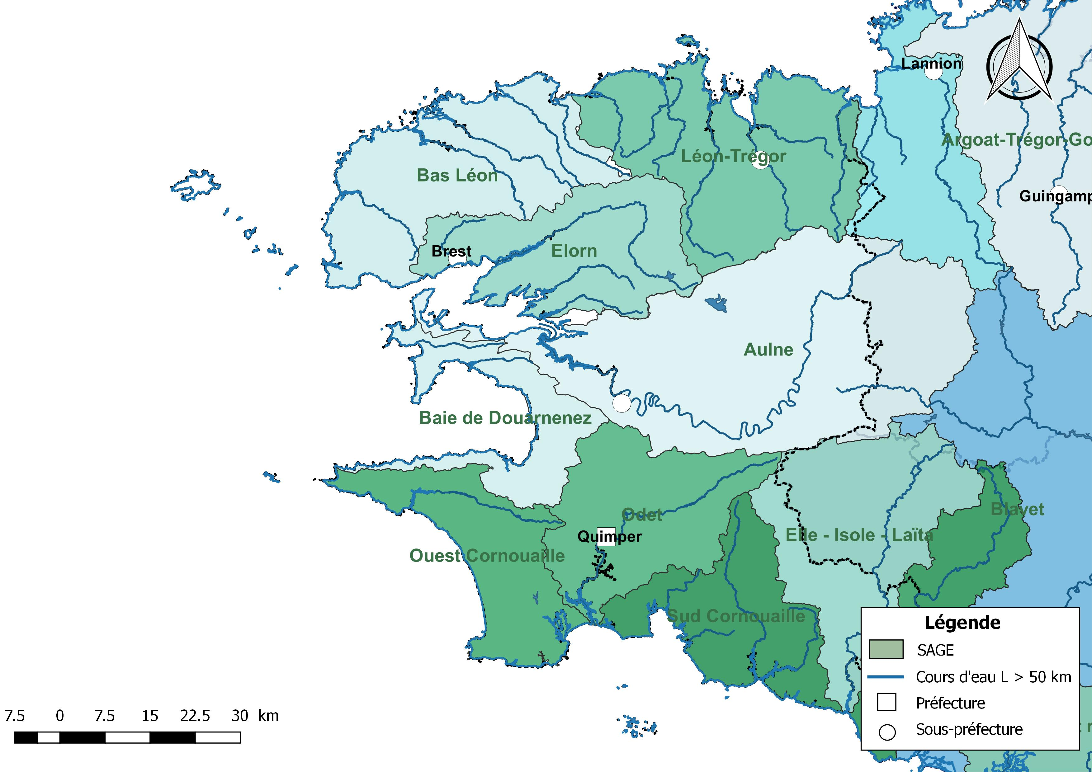 Carte des schémas d'aménagement et de gestion des eaux (SAGE) concernant le département du Finistère (France) au 1er janvier 2018.